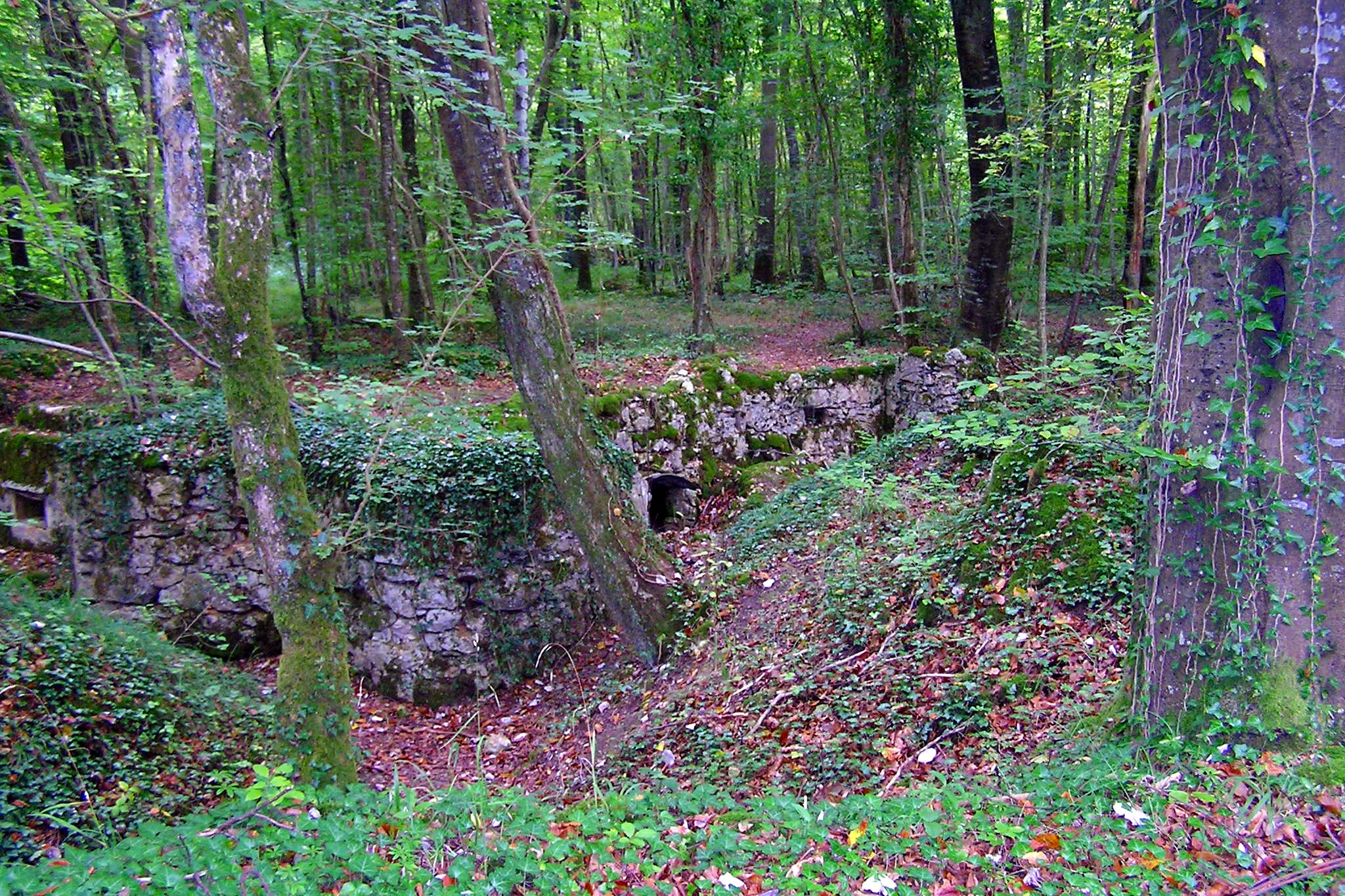 tranchées saillant de Saint Mihiel